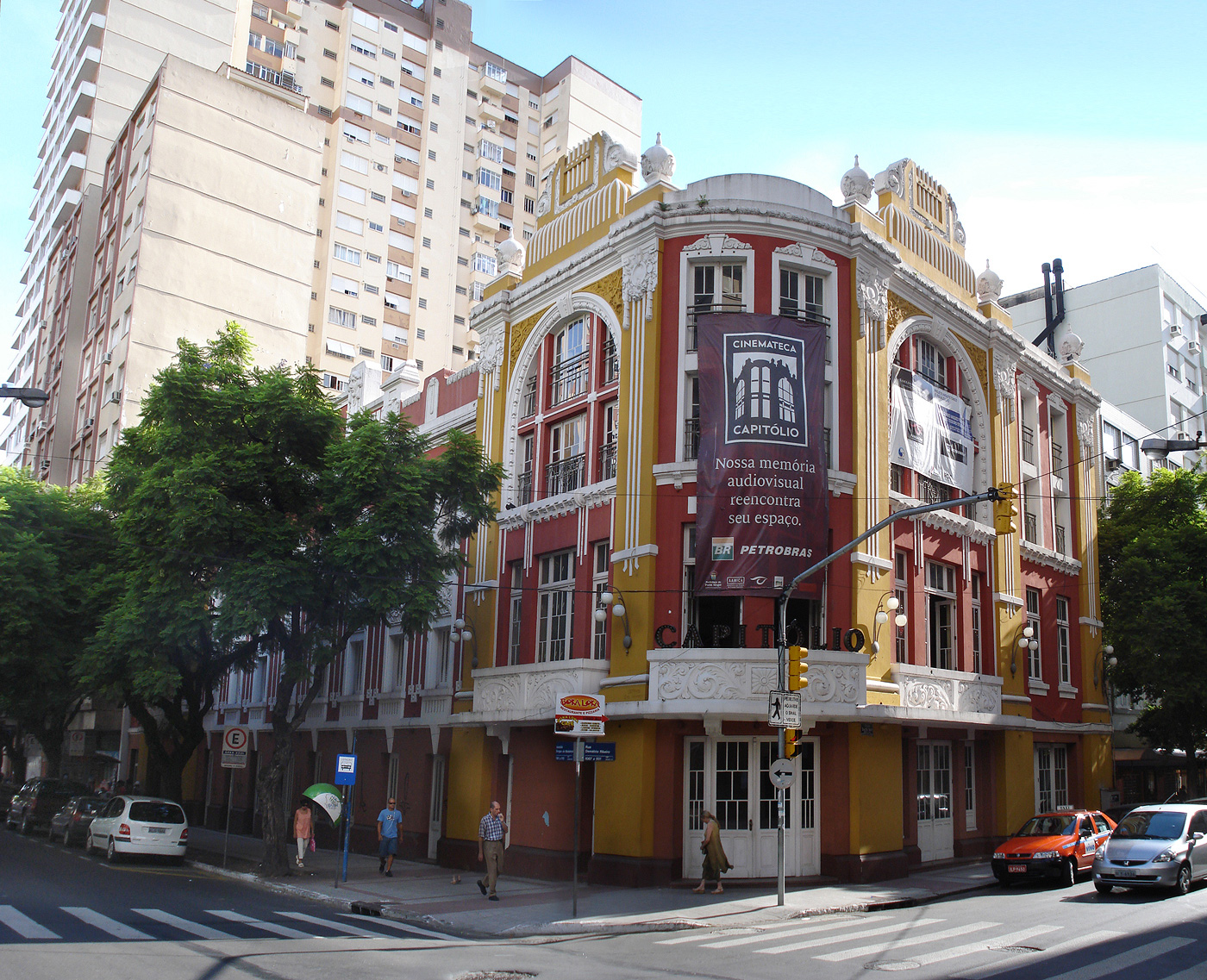 Cine Theatro Capitólio, 1928, Porto Alegre, Brasil. Projetado e construído pelo engenheiro Domingos Rocco.